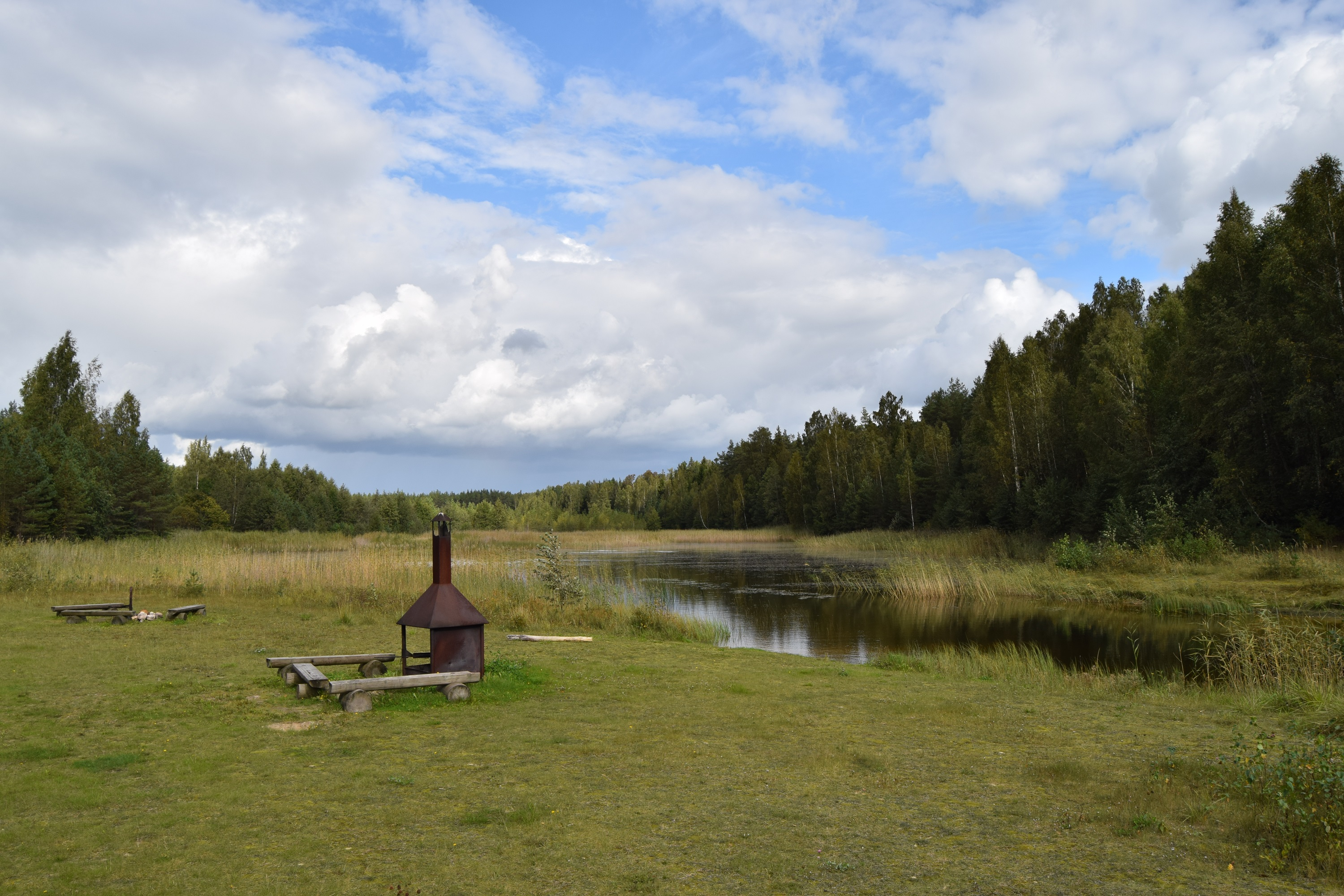 RMK lõkkekoht Kellissaare karjääri ääres